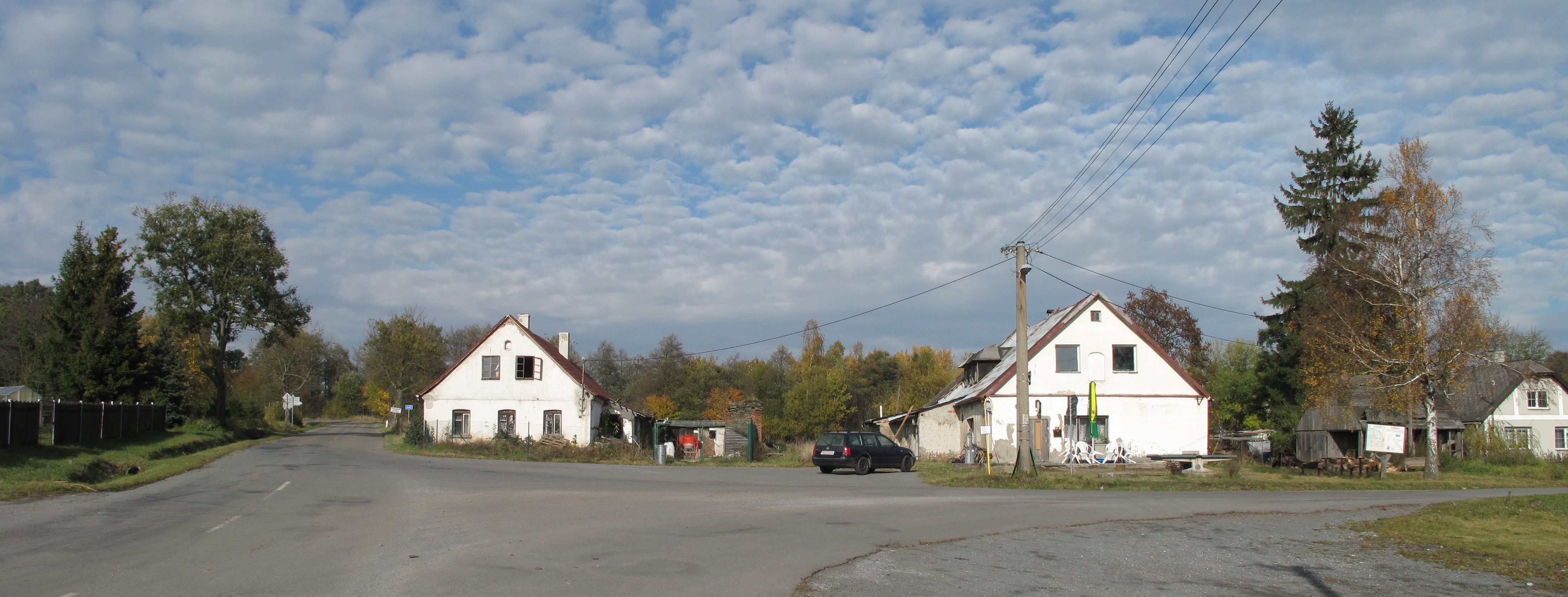 Stará Libavá. Okres Olomouc, Česká republika.